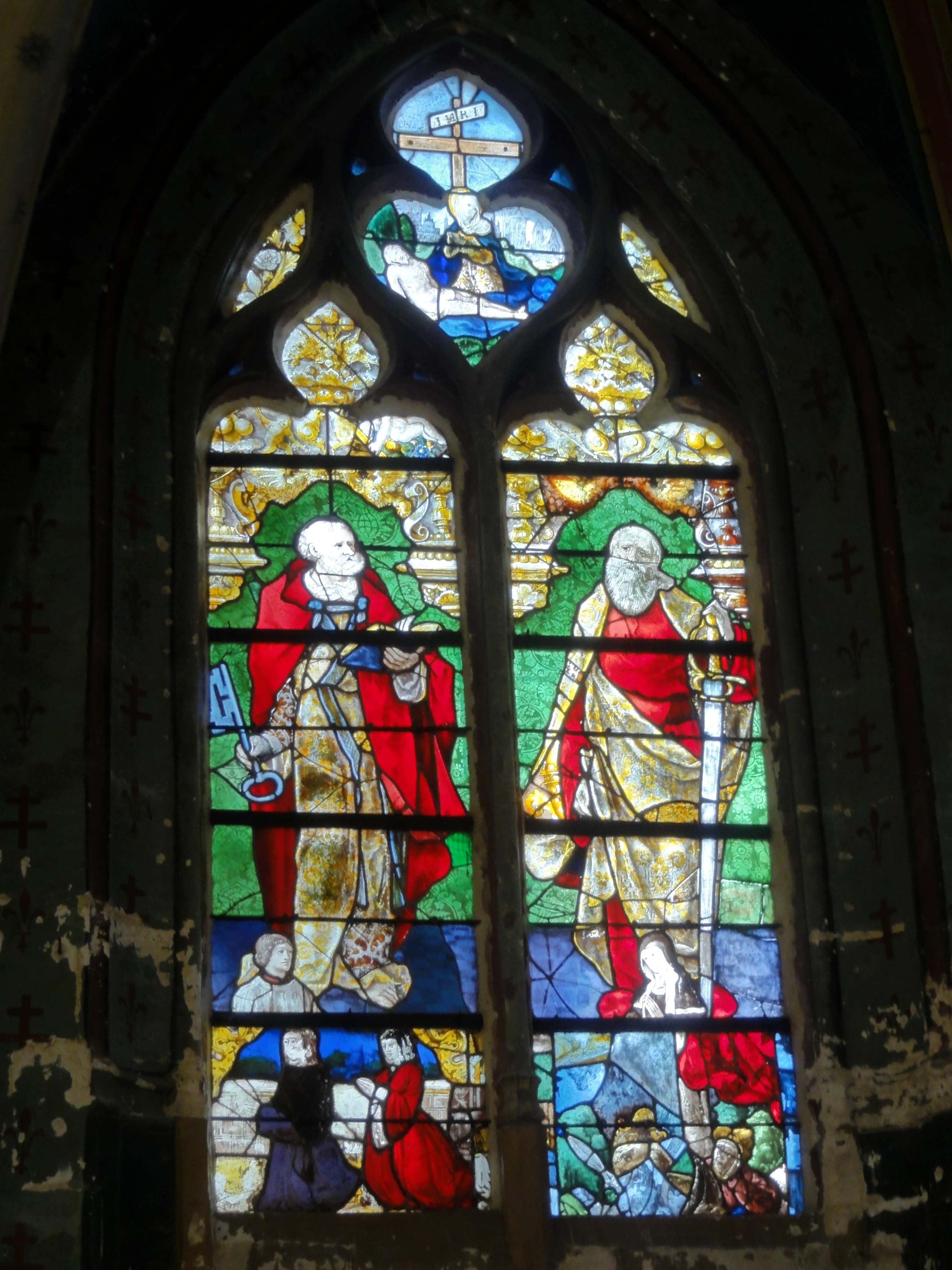 Verrière n° 1 : Saint Pierre et saint Paul.